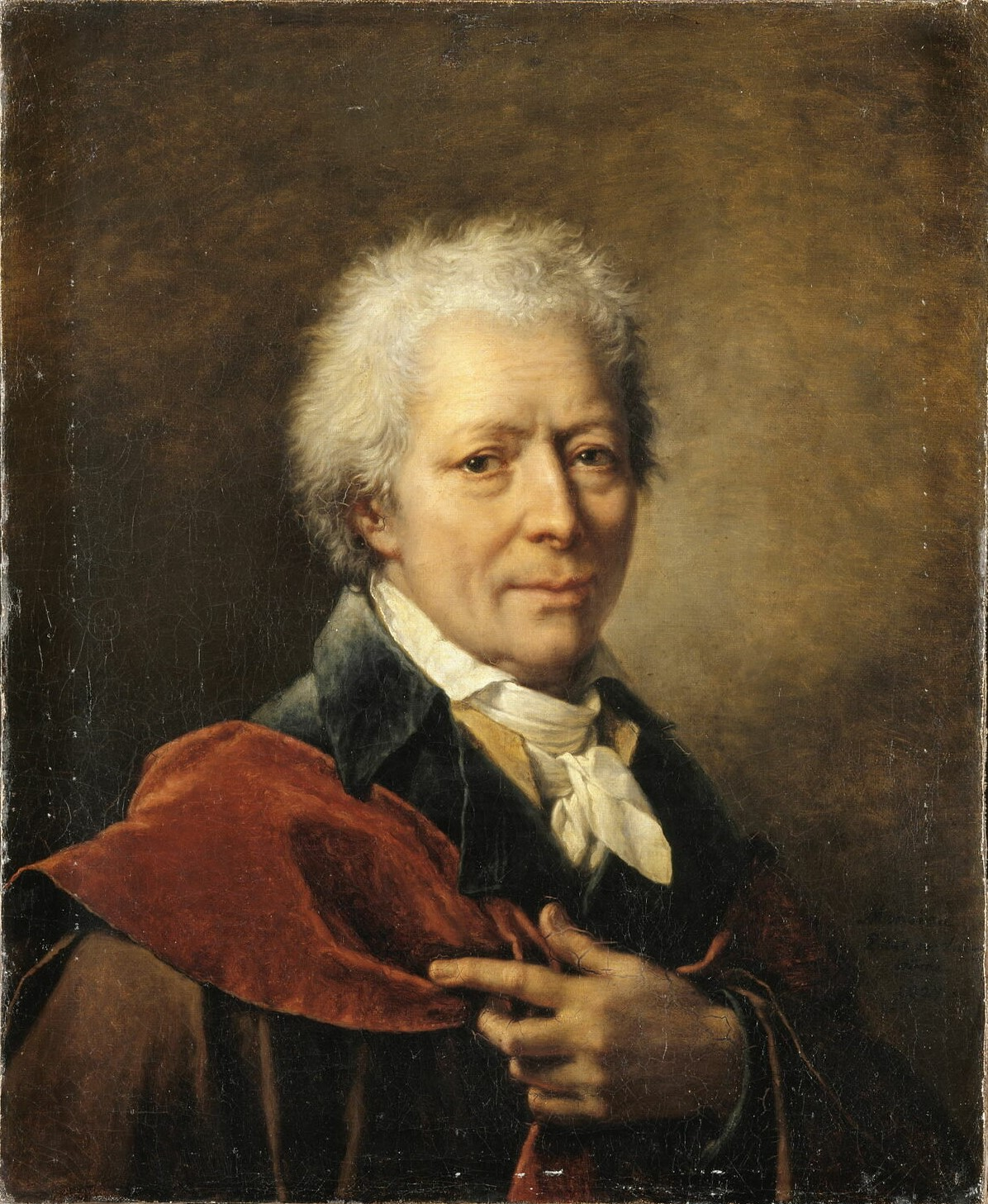 Portrait de l'artiste - autoportrait (1754-1837)